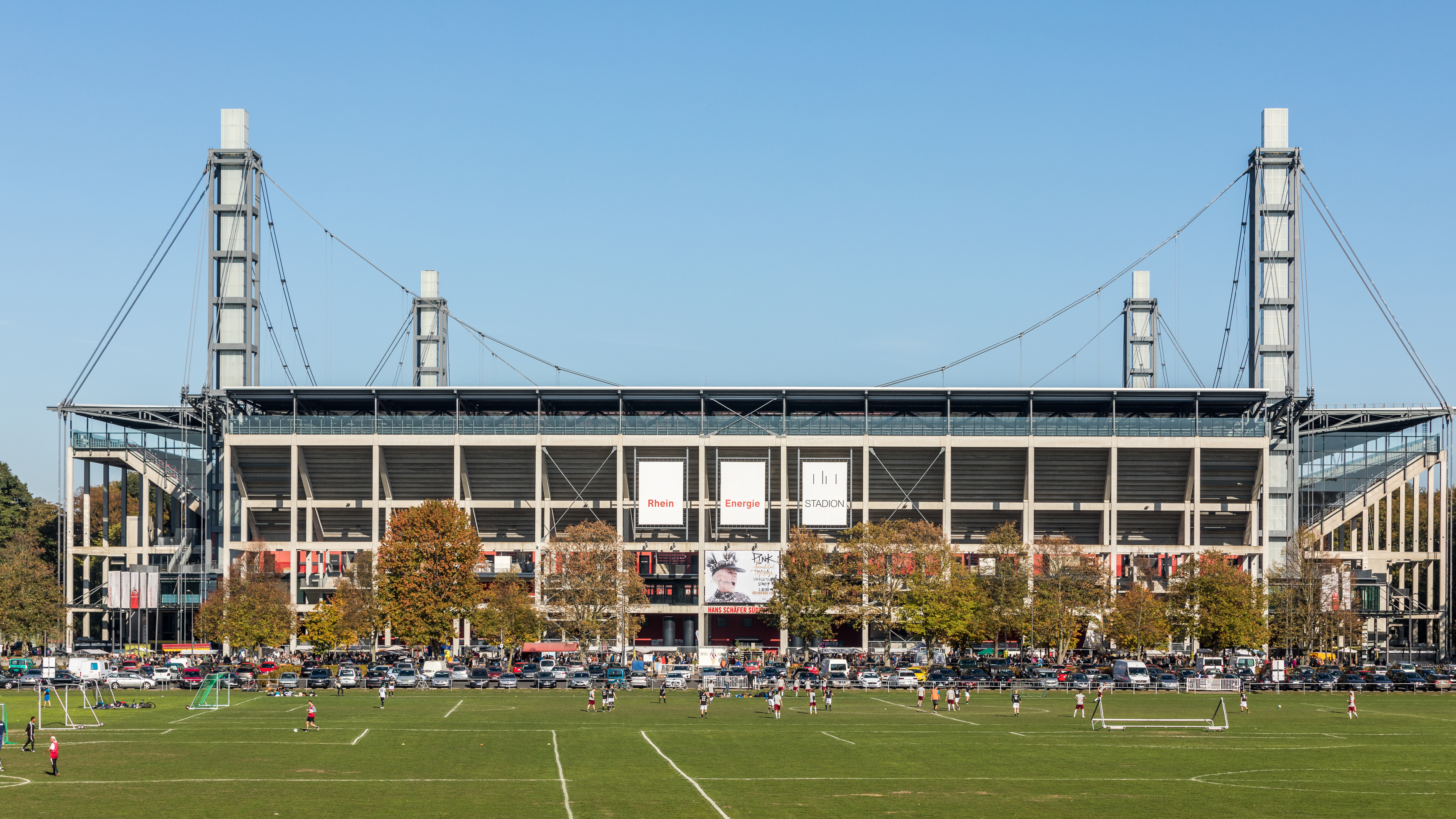 RheinEnergieStadion, Südseite